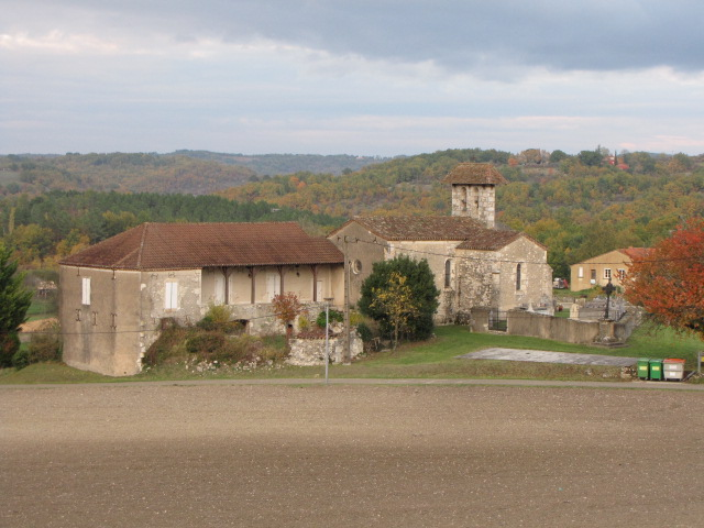 Église de Farguettes